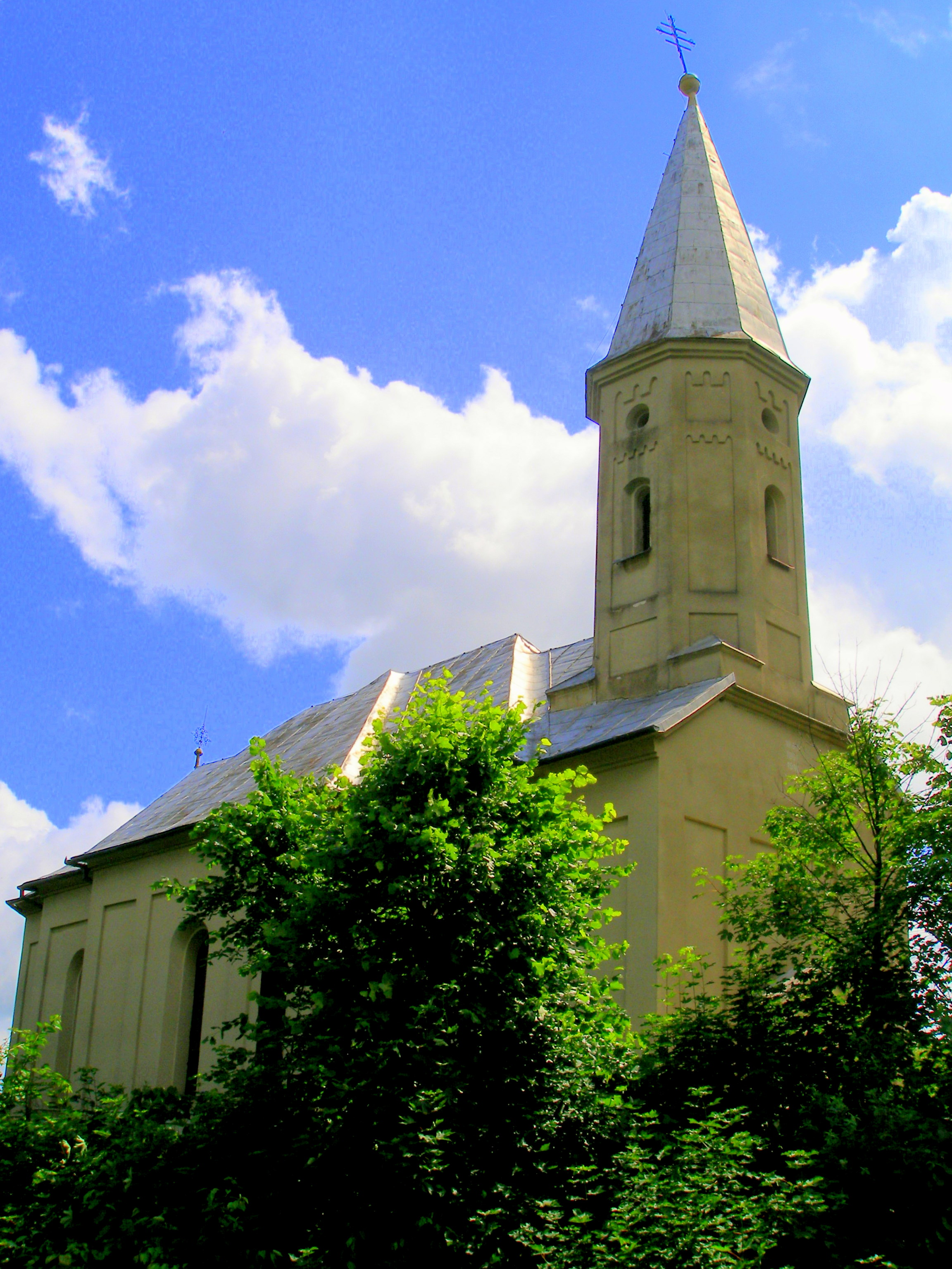 Bajerovce (okr. Sabinov), gréckokatolícky Kostol svätého Michala archanjela